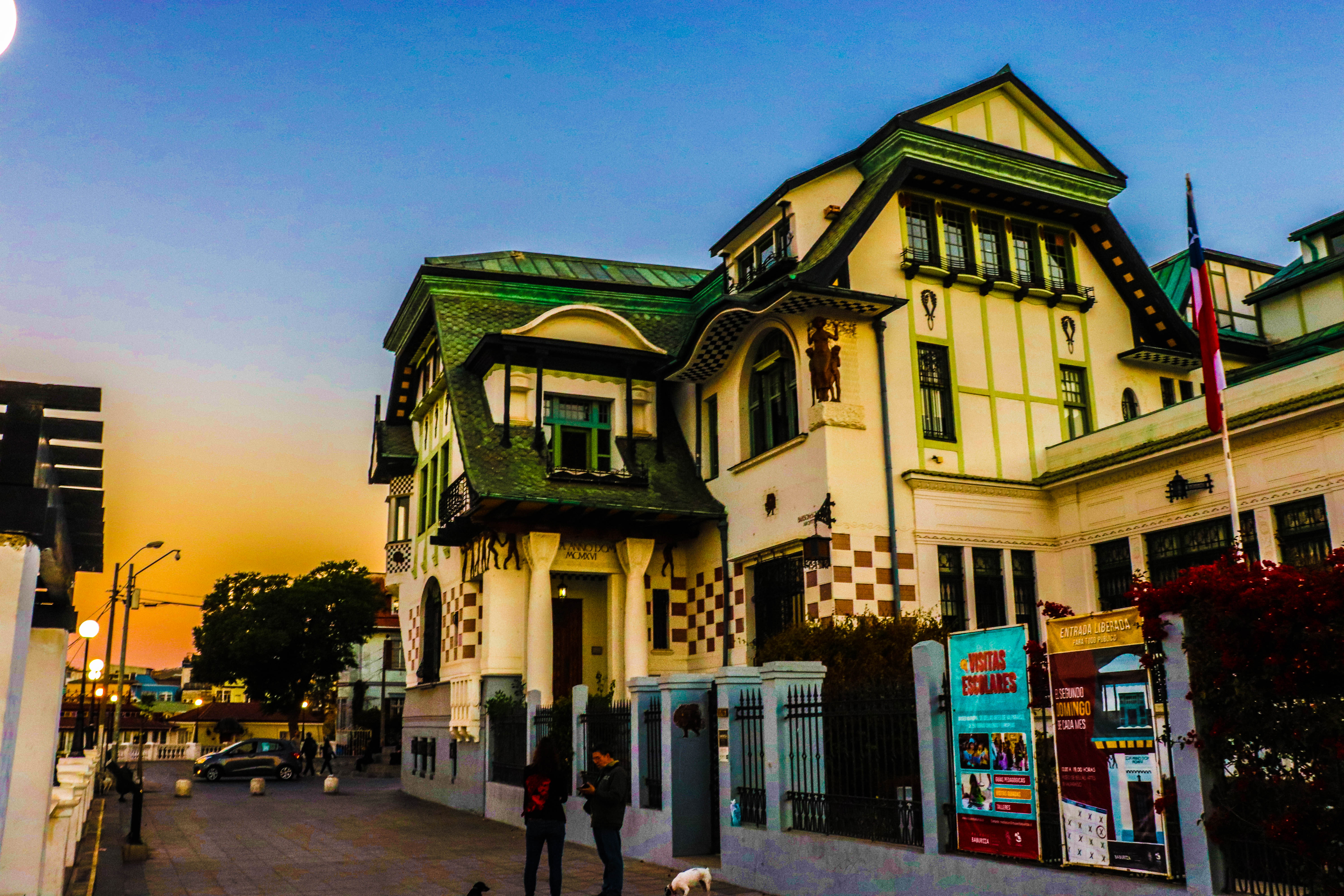 Valparaiso